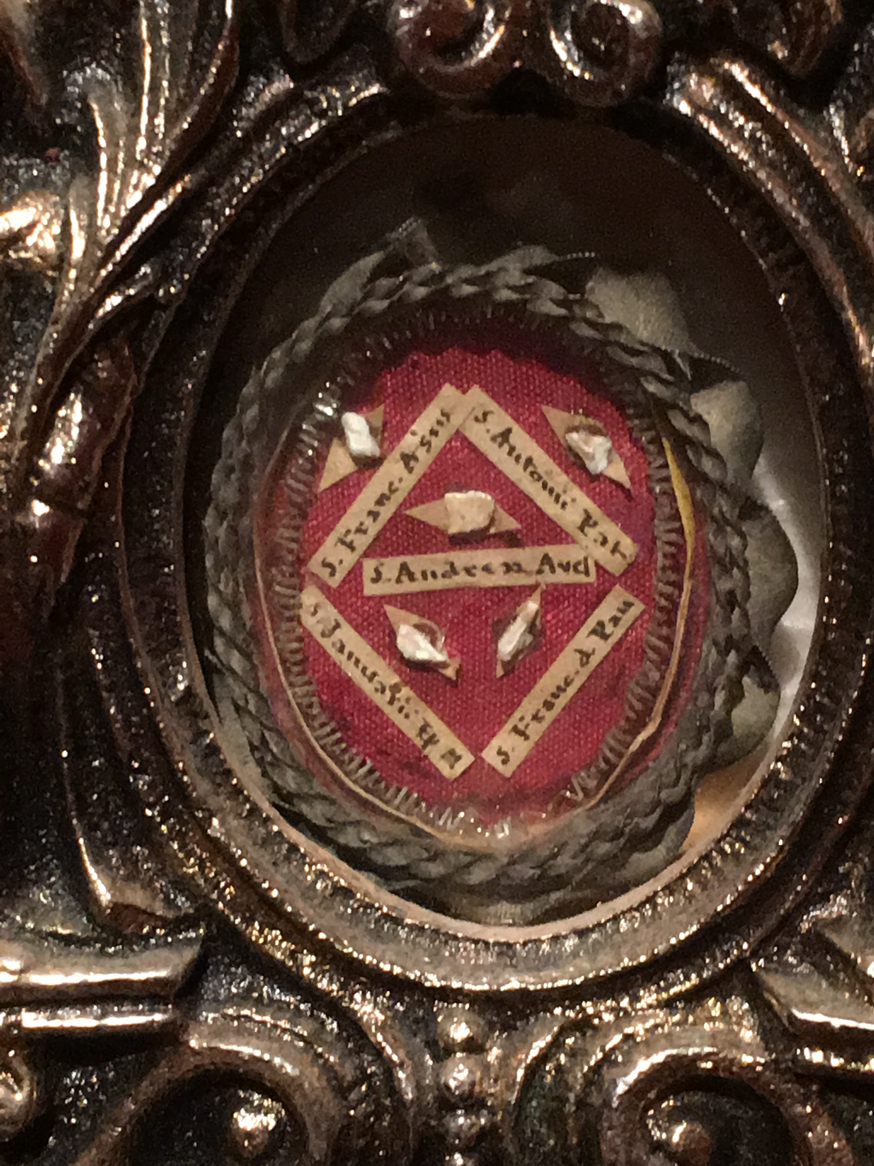 Reliquias - Ex ossibus St.António , St.Francisco Assis .St.Francisco Xavier , St.Januario e St.André , Apóstolo